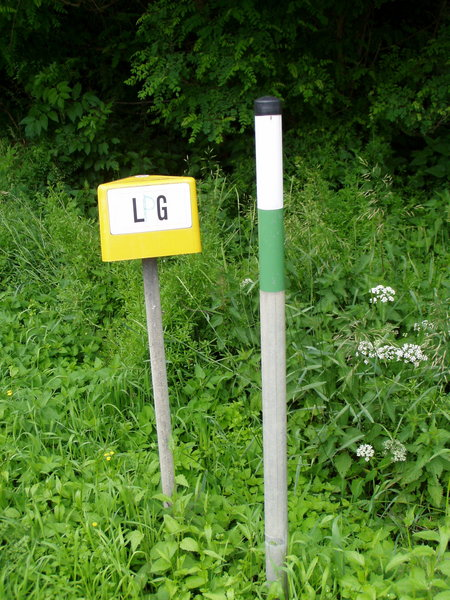 Moderne Grenzabmarkung, hier an der Landesgrenze zwischen Thüringen und Sachsen bei Windischleuba.